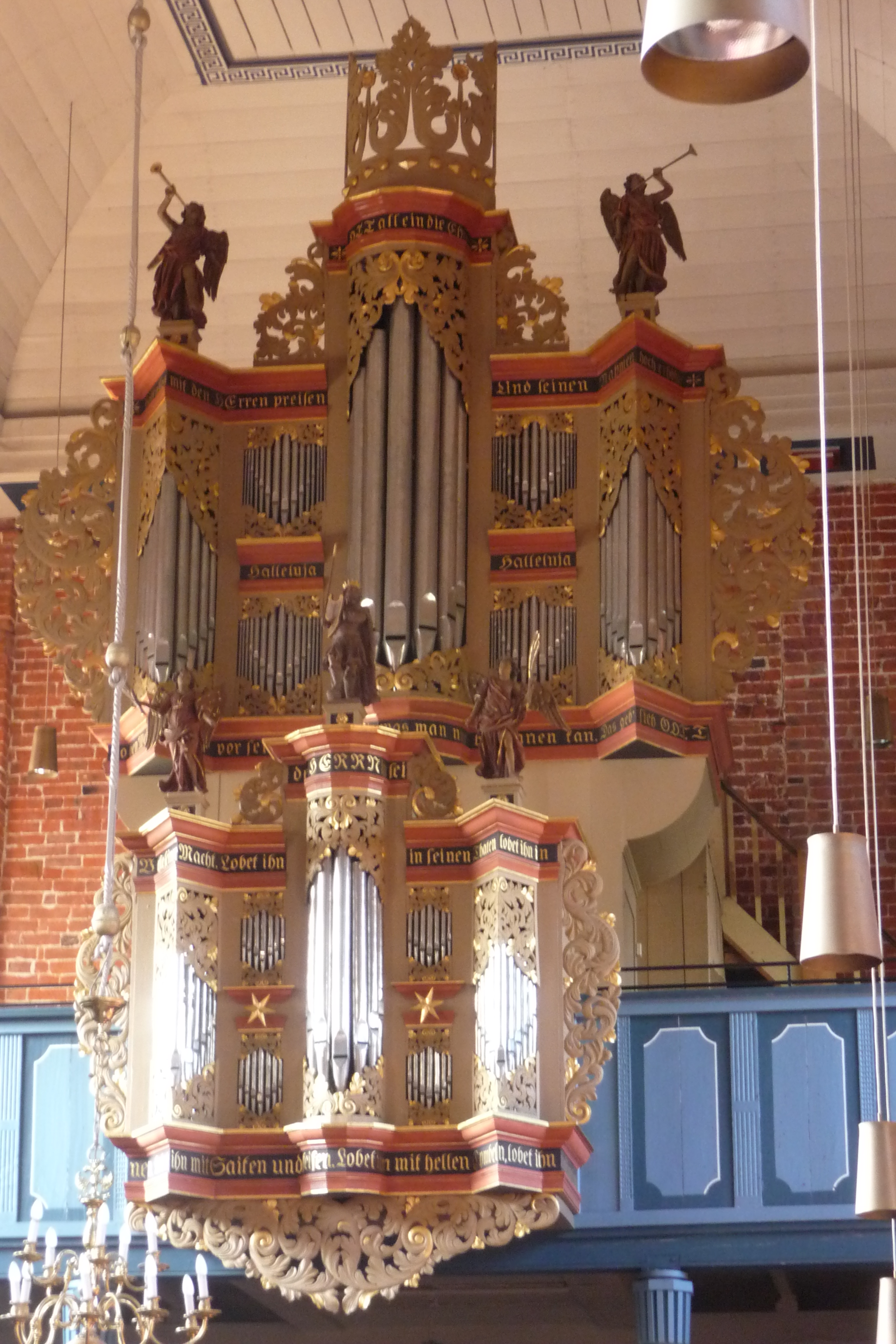 Orgel in Marienhafe von Gerhard von Holy